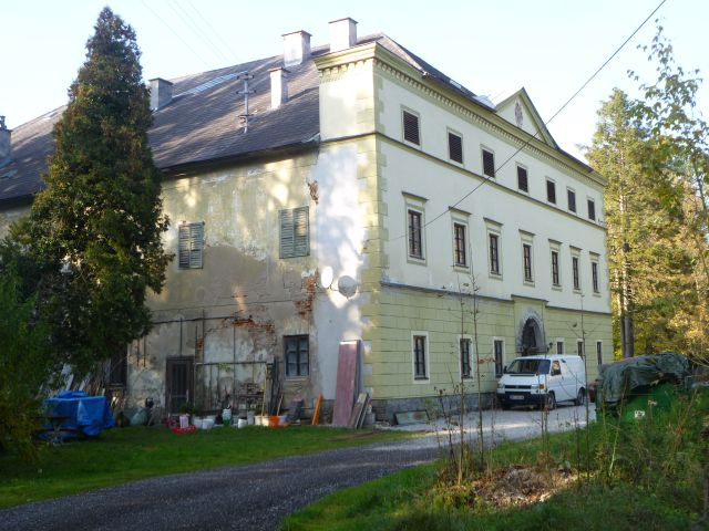 Schloss Inharting_Herrenhaus